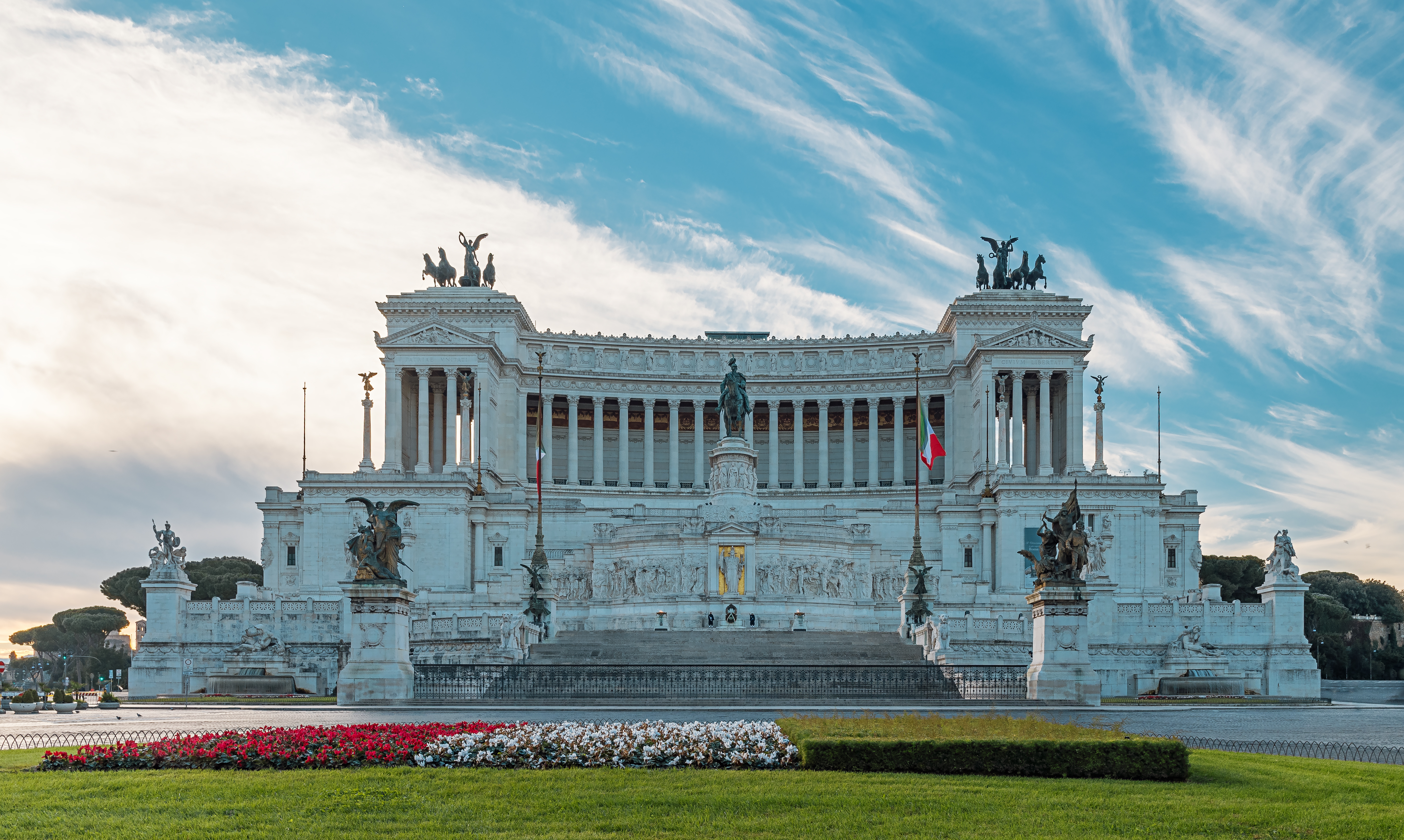 Das Nationaldenkmal Monumento a Vittorio Emanuele II auf dem Kapitolshügel in Rom